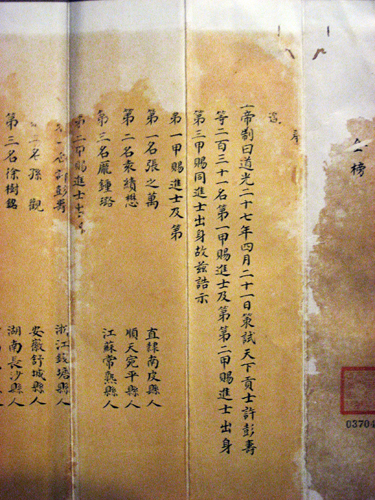 中央研究院歷史文物陳列館典藏的道光27年小金榜